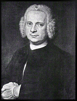 1766-Ernst Julius von Seidlitz, comte. Il est un des trois fondateurs de l'église morave à gnadenfrei Silésie (Pilawa Gorna en Pologne)